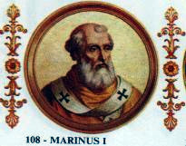 Pope Marinus I